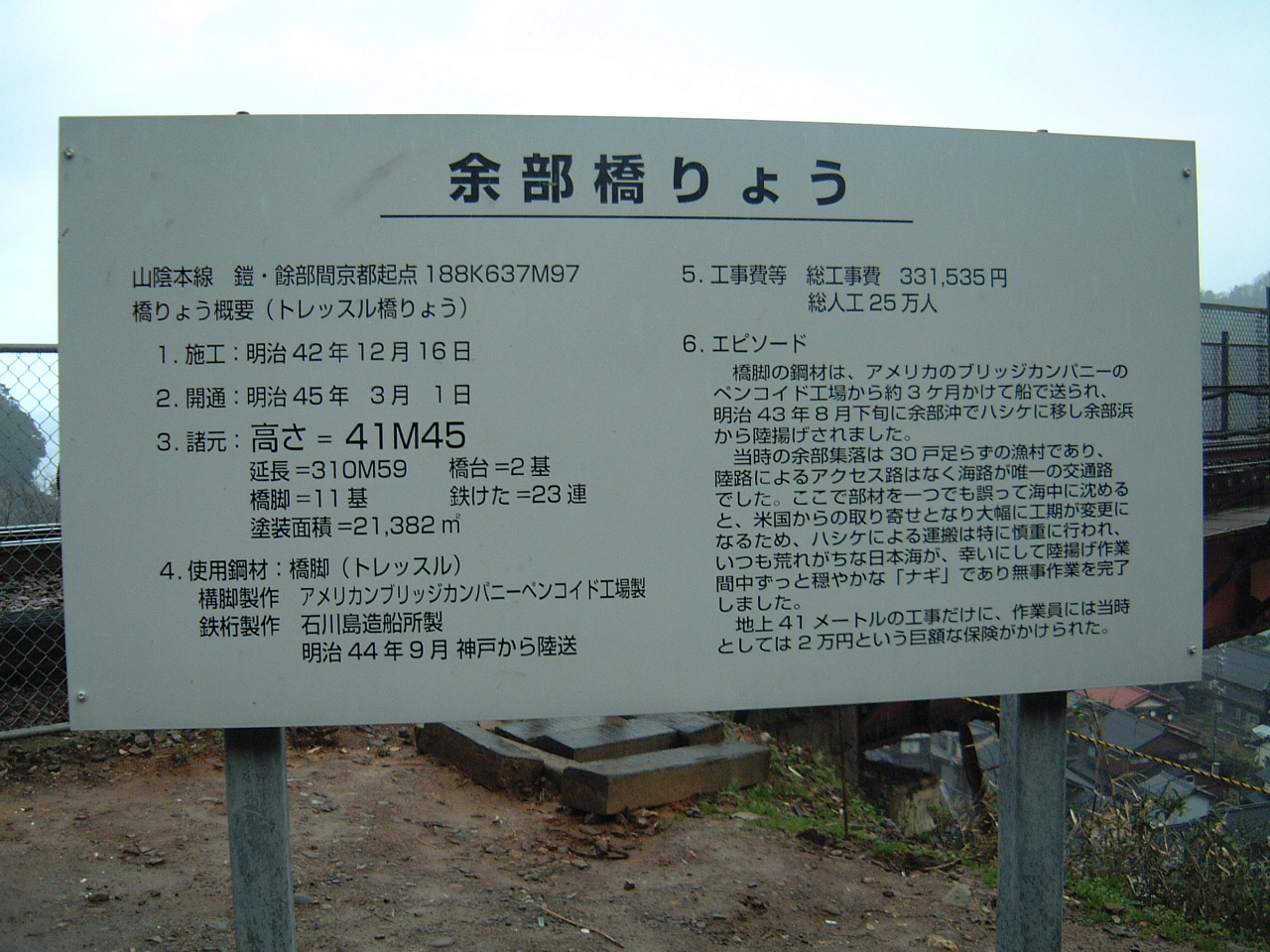 餘部橋梁の解説表